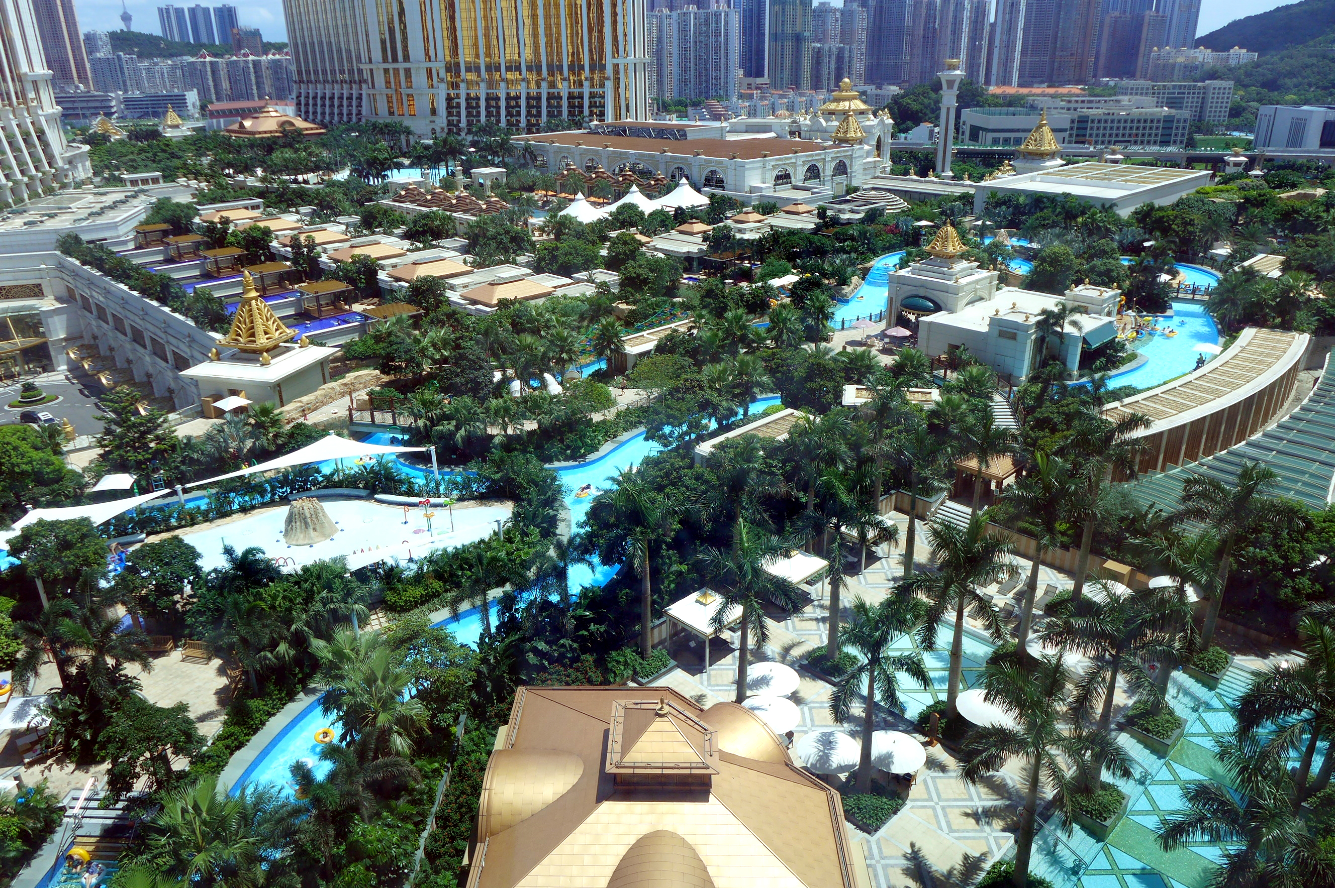 Galaxy Macau Grand Resort Deck Overview